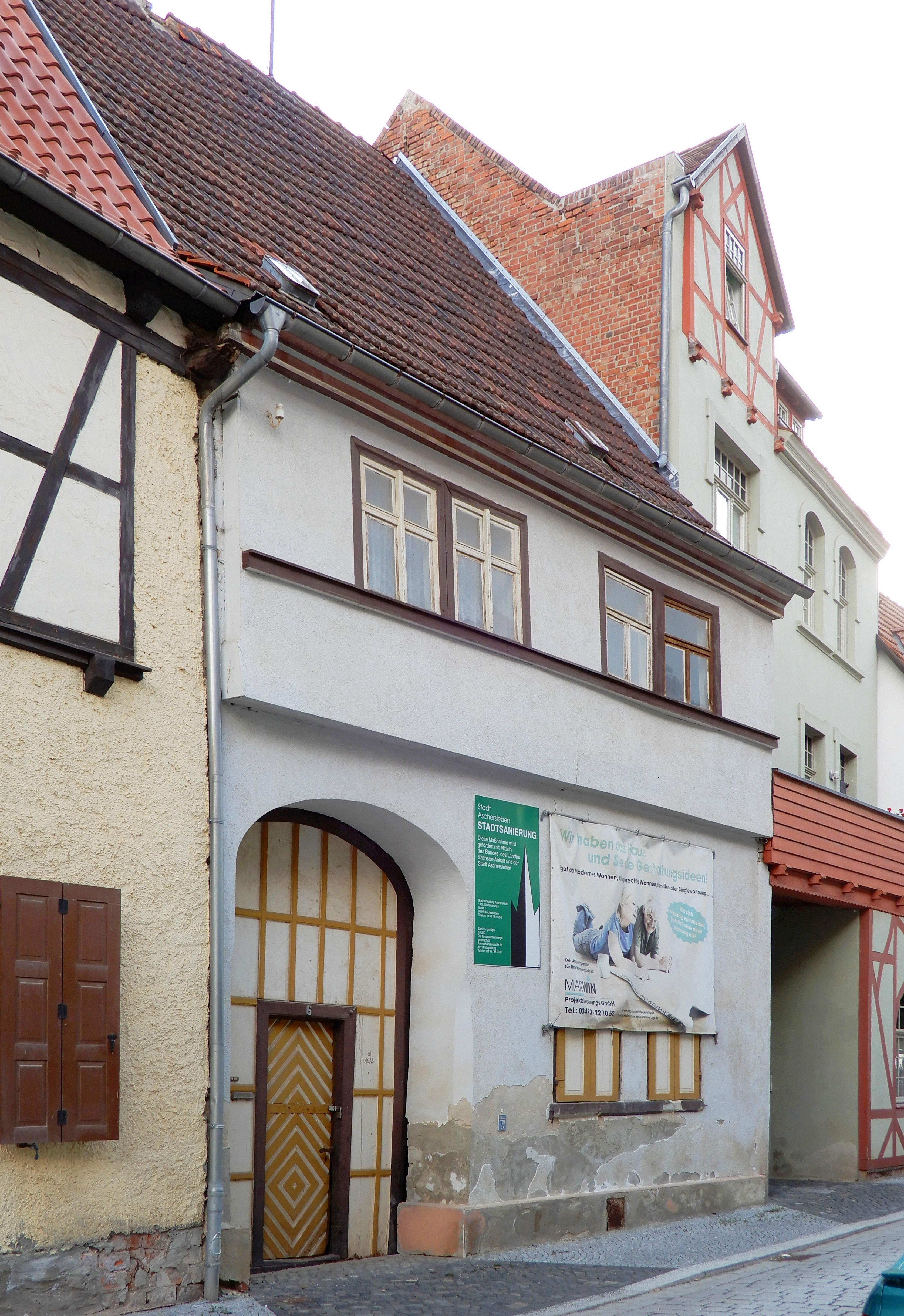 Gebäude Über dem Wasser 6 in Aschersleben